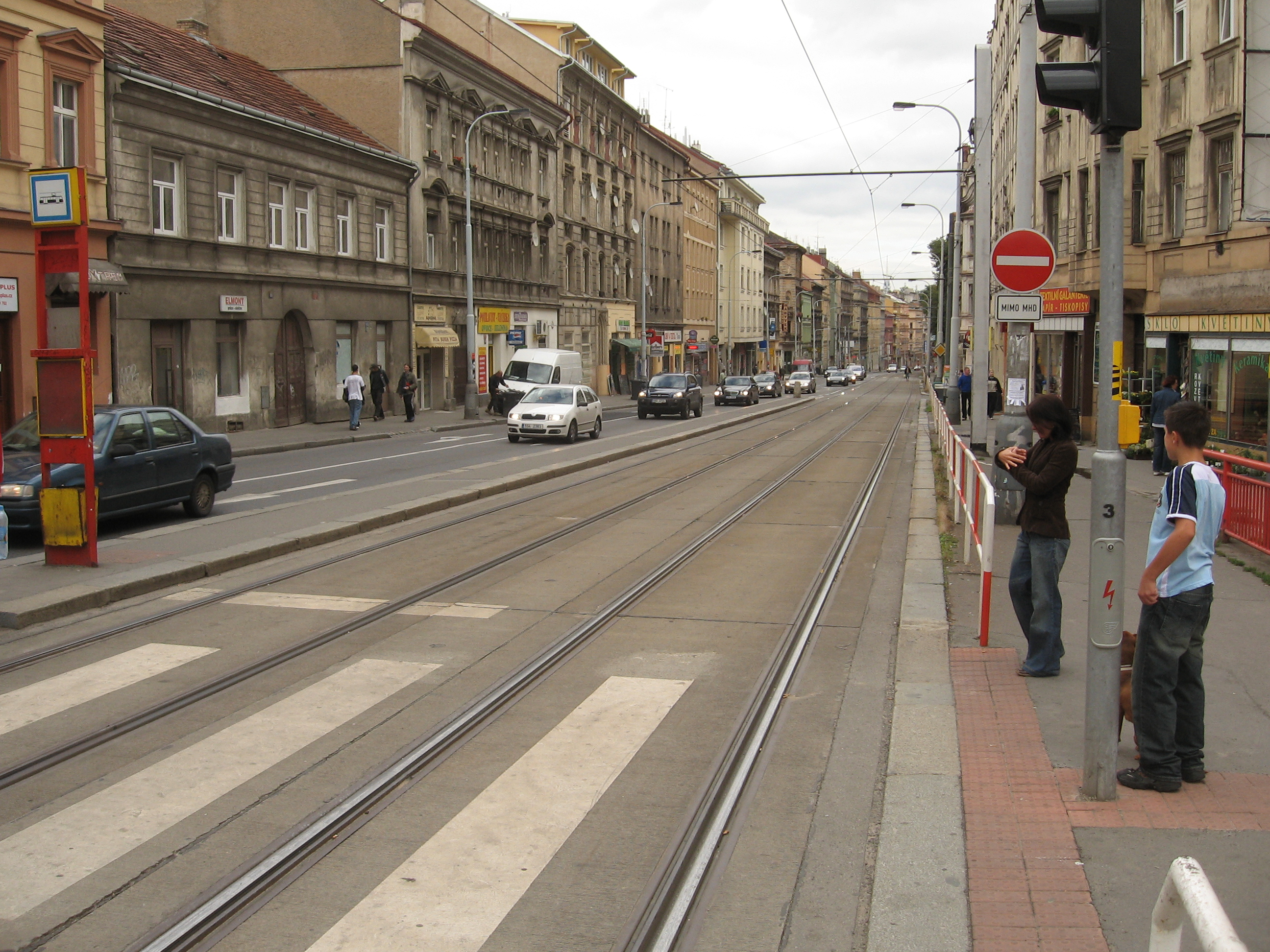 Praha, Plzeňská ulice. Prague, Plzeňská Street